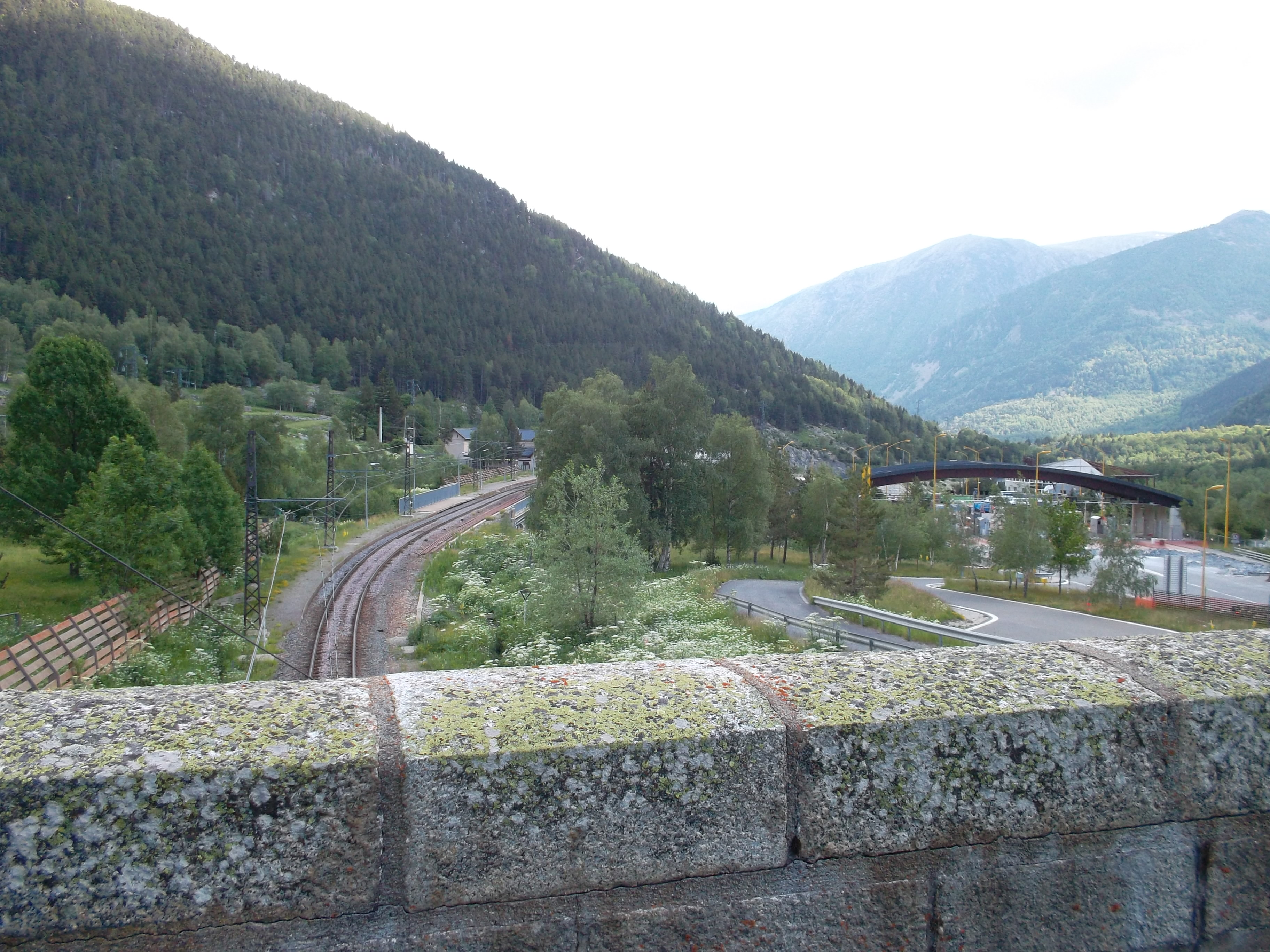 Photographie prise au dessus de la tête sud du tunnel ferroviaire du Puymorens. On peut distinguer les premier bâtiments de la gare de Portet-Puymorens dans le prolongement de le voie, et le péage du tunnel routier sur la droite.